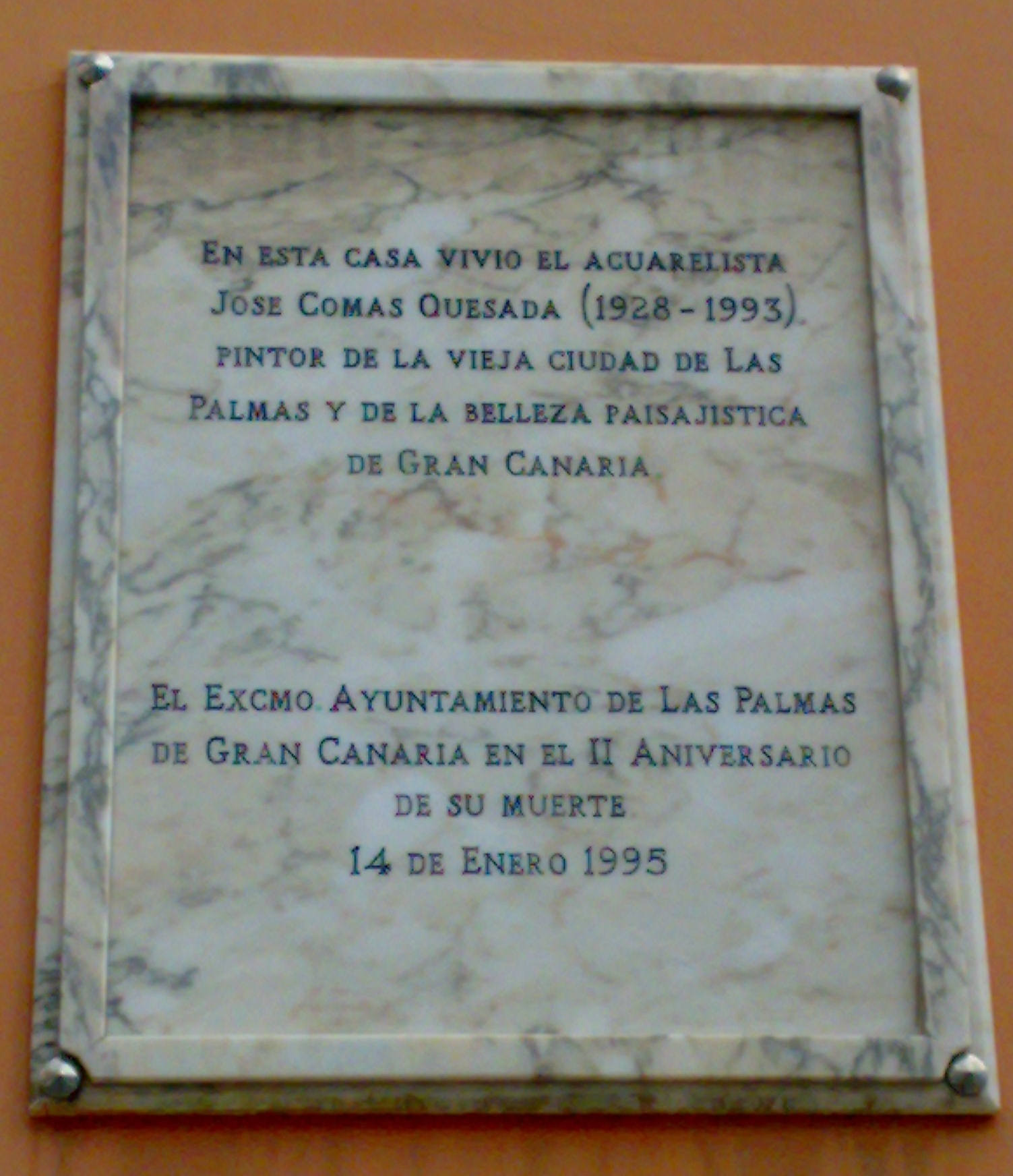 Lápida ubicada en la casa donde vivió el pintor.